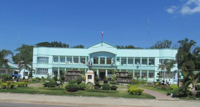 Tagalog: Bulwagang Bayan ng Ubay sa probinsiya ng Bohol sa Pilipinas